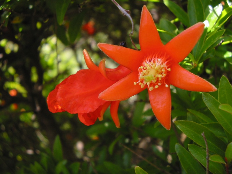 Punica granatum, 14 juin 2004, Jardin alpin, Jardin des Plantes de Paris (Jardin des Plantes de Paris)